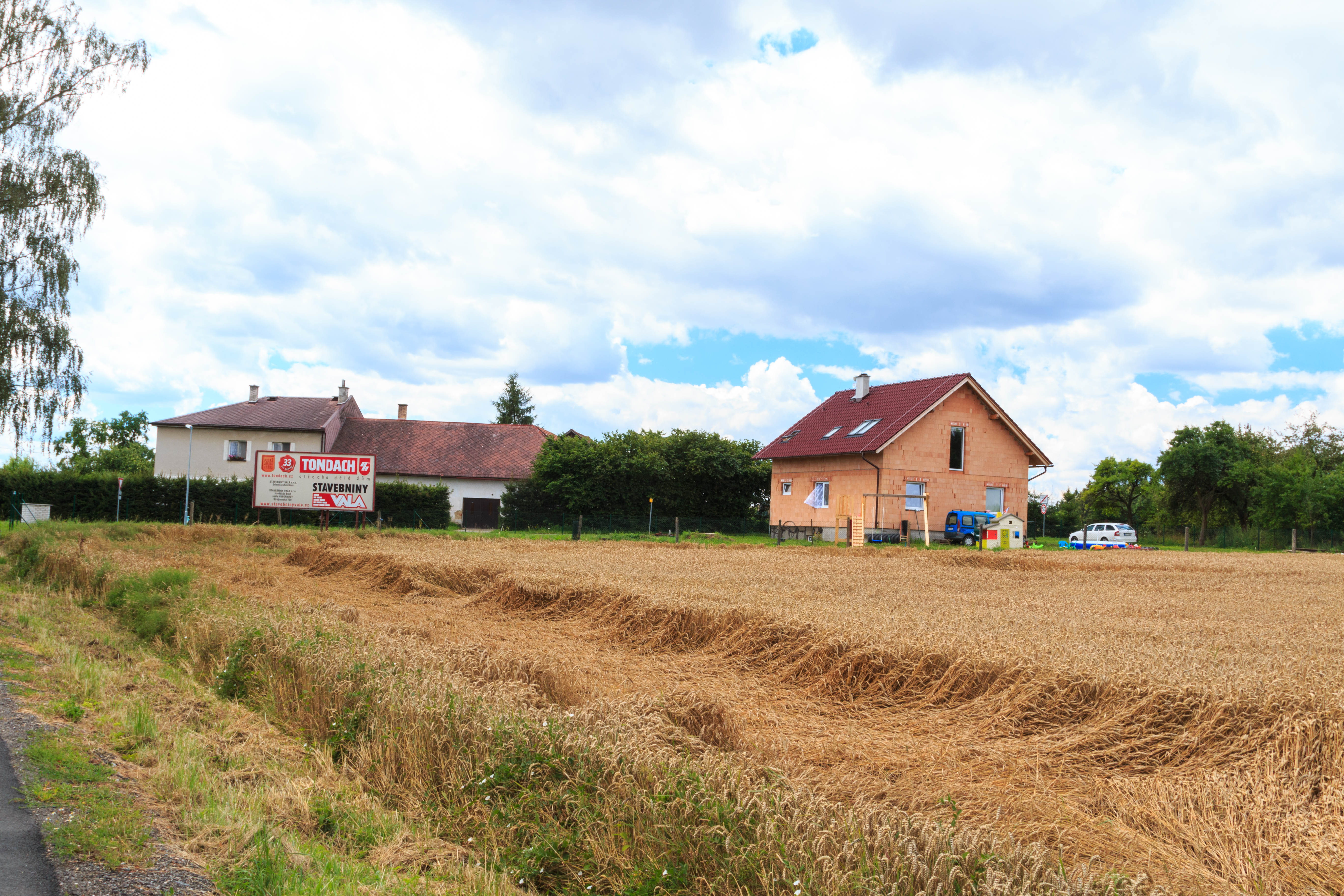 Český Dvůr - novostavba